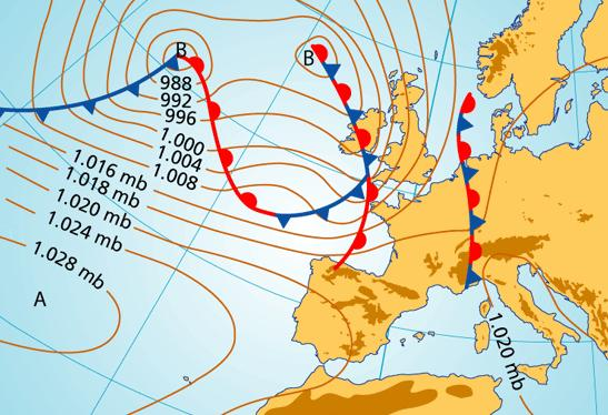 isobaras